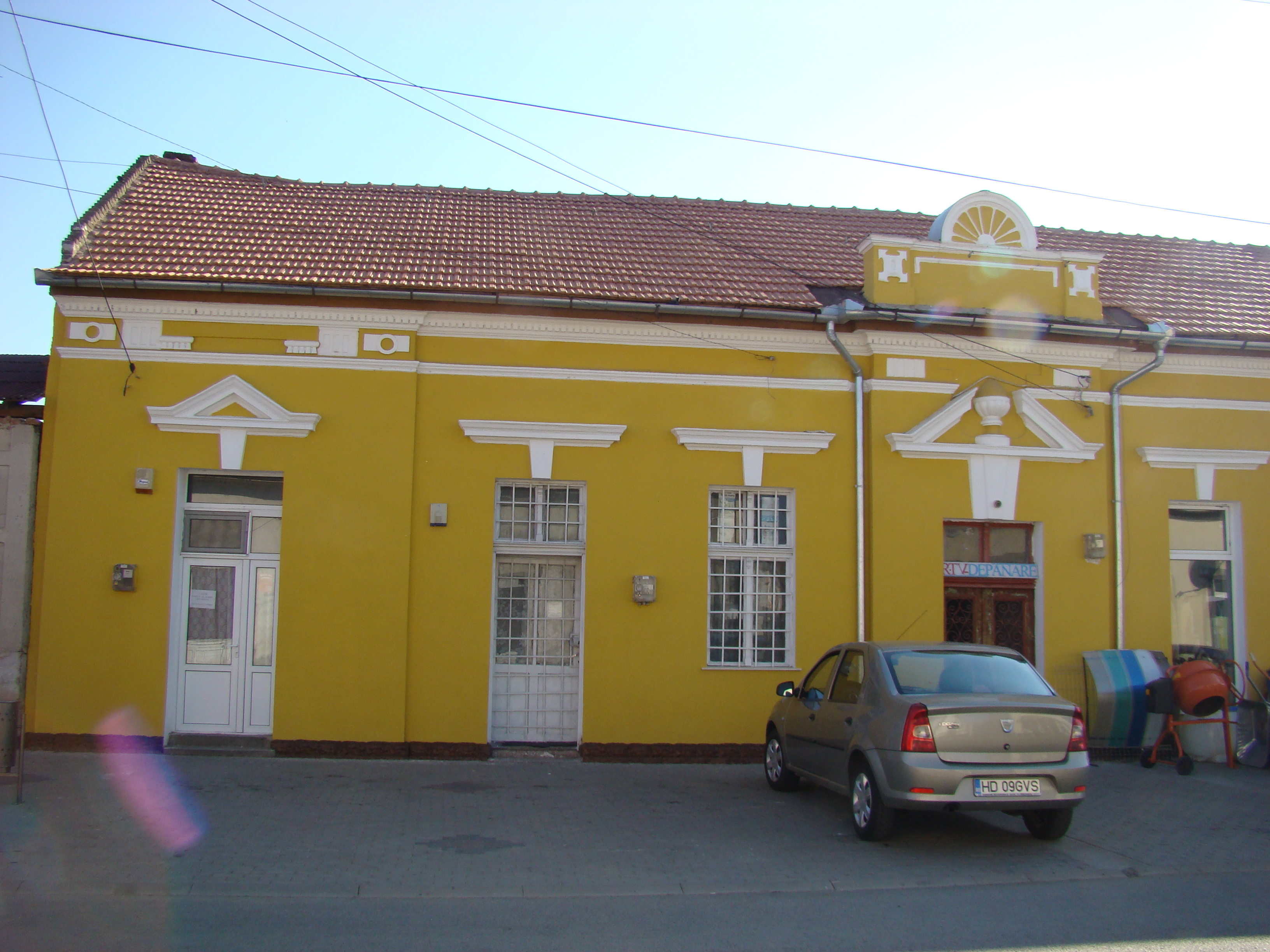 Casă, sat ILIA; comuna ILIA